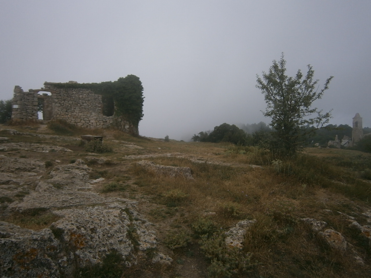 Ruïnes de la Mussara: a l'esquerra, el refugi vell conegut com el Xalet de les Airasses, i a la dreta, el campanar de l'església de Sant Salvador